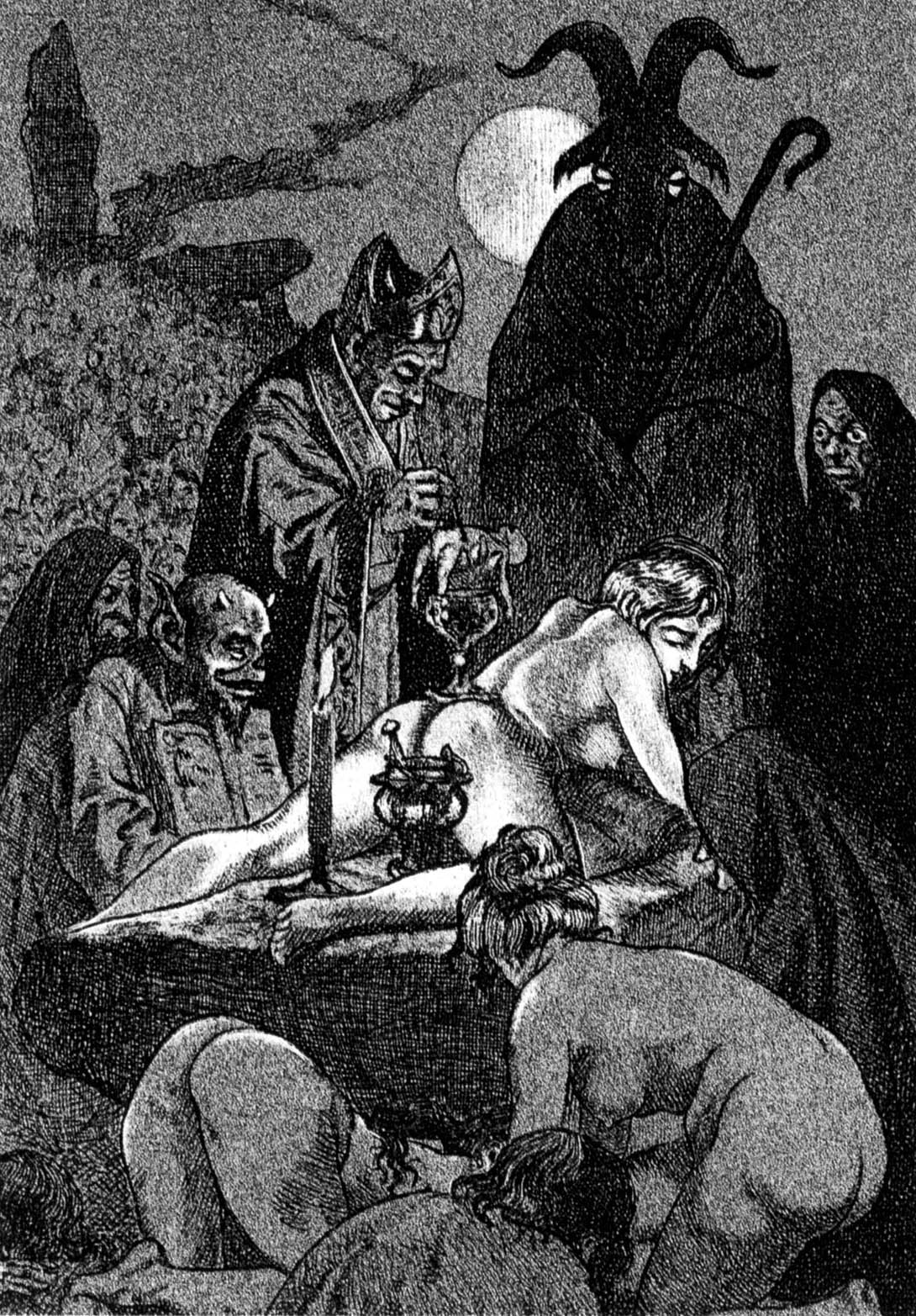 Dessins de Martin van Maële.